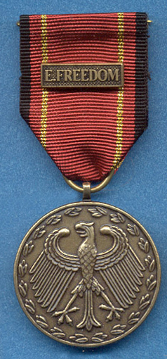 Airbornelawyer 22:03, 23. Jul. 2007 (CEST)